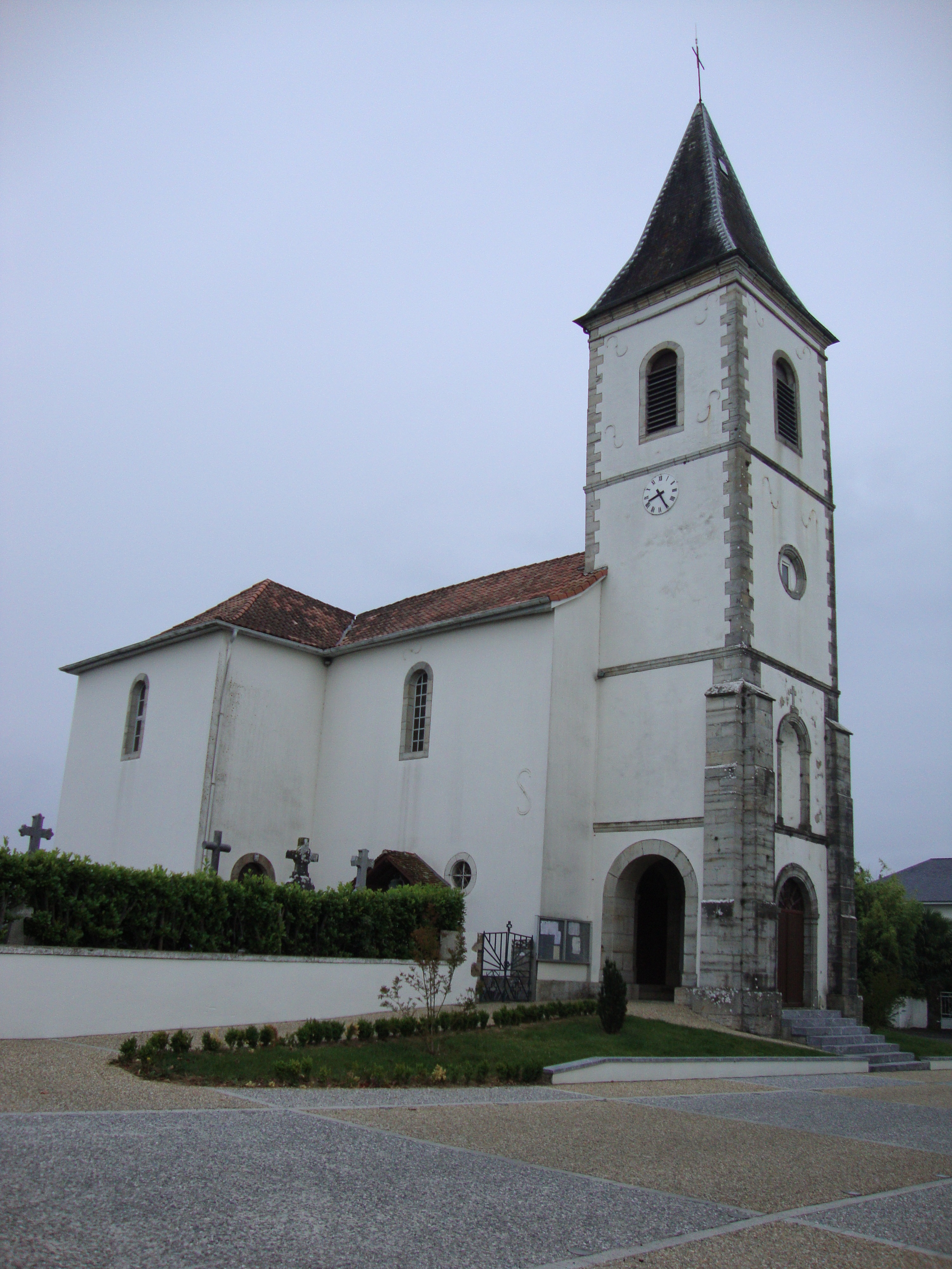 Béhasque (Béhasque-Lapiste, Pyr-Atl, Fr) church